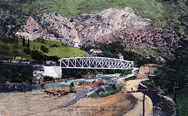 Sićevačka klisura, most preko nišave na magistralnoj pruzi Niš-Sofija, i manastir Sv. Petka Iverica (iza mosta)